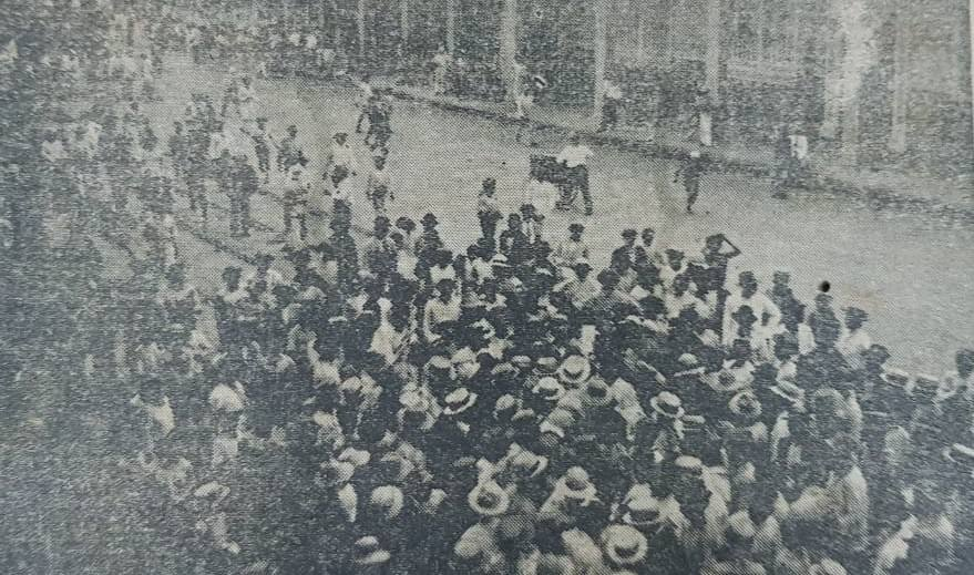 Marcha de trabajadores 12 de noviembre 1922